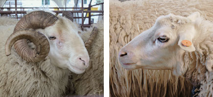 Moltó i ovella mallorquina